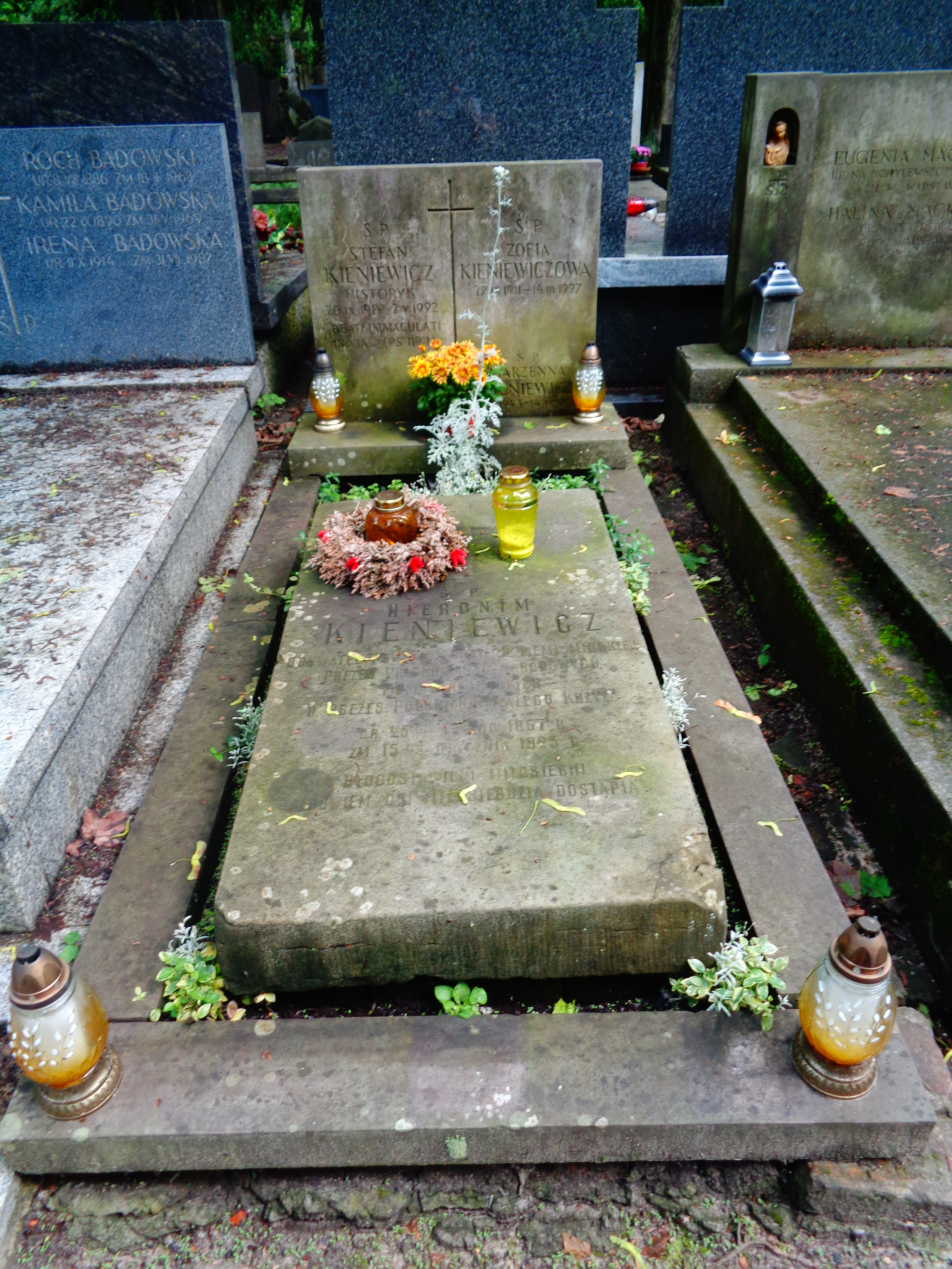 Grób Stefana Kieniewicza na Cmentarzu Powązkowskim